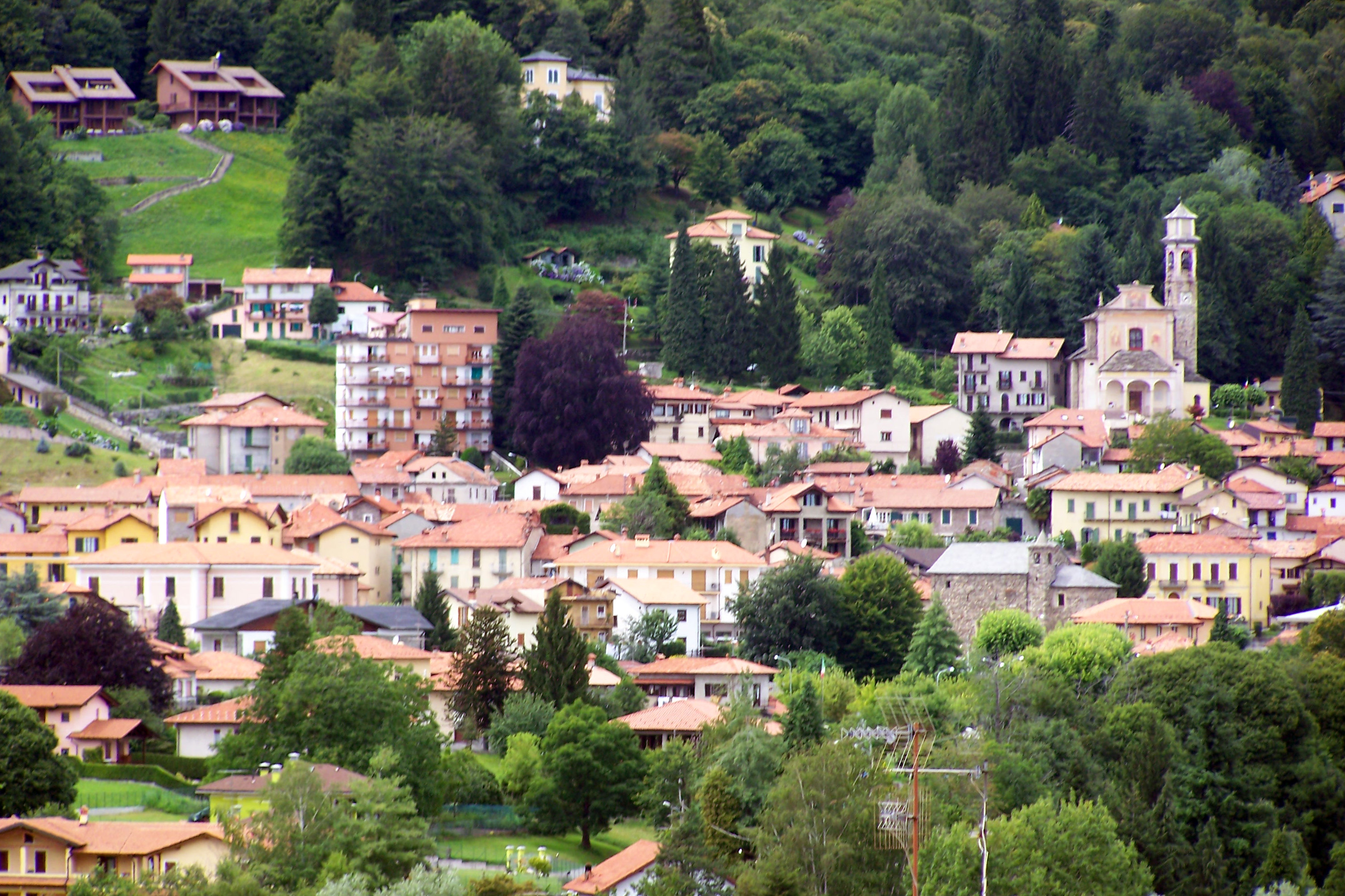 panorama di gignese